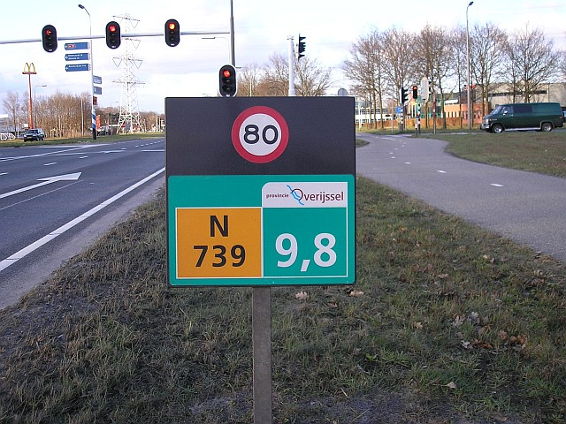 Hectometerbord N739 / 9,8km (Haaksbergerstraat, Hengelo OV) met snelheidslimiet 80km/uur en "provincie Overijssel". Foto: Pudding4brains 2006/04/05, Publiek Domein / Public Domain Trefwoorden: hectometerbord; hectometerpaal; N739; 9,8; 80; Hengelo OV; "provincie Overijssel"; verkeerslicht; verkeerslichtenportaal; Mac Donalds; ANWB wegwijzer